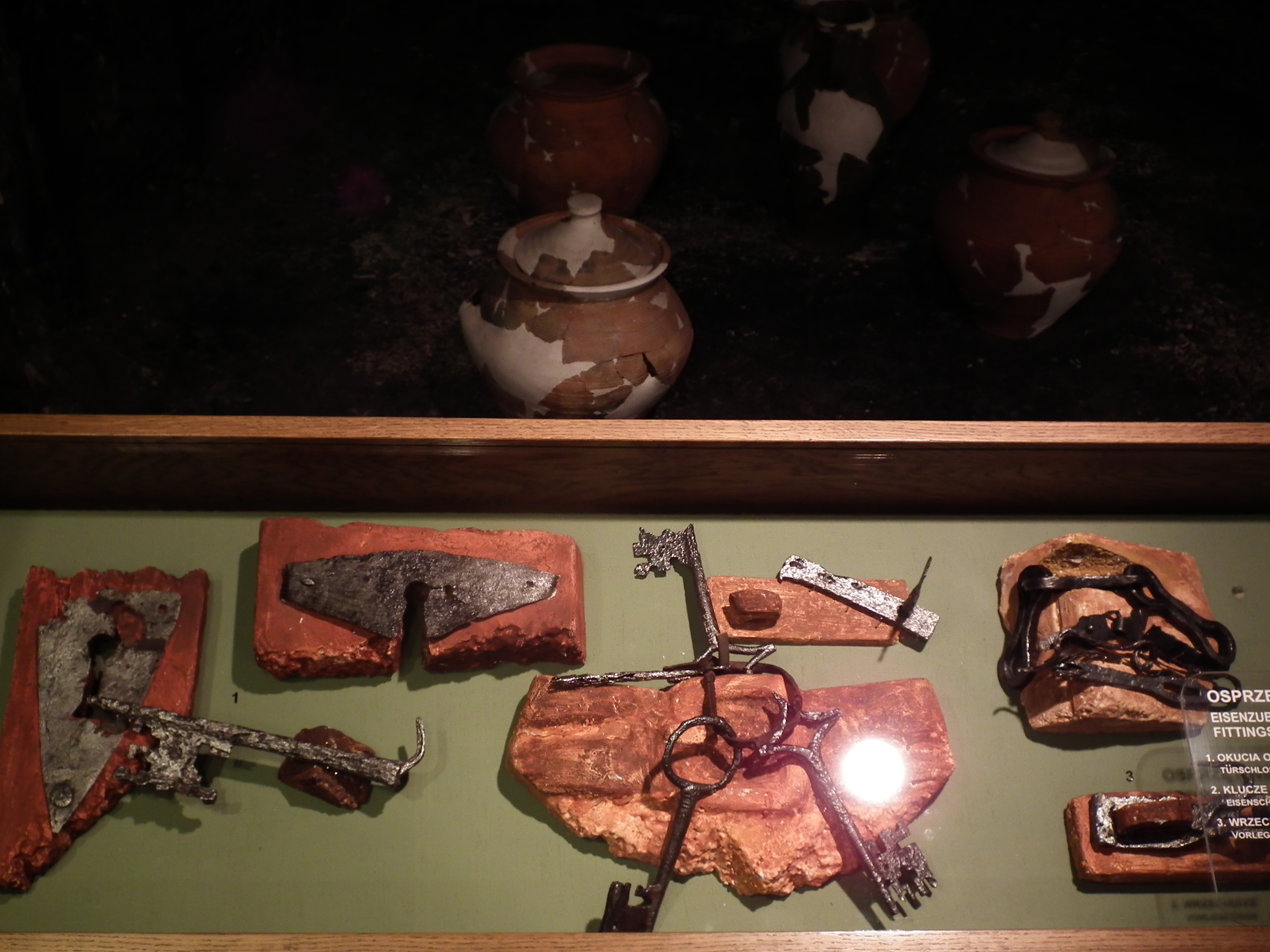 Grodzisko w Plemiętach - materiały w Muzeum w Grudziądzu.